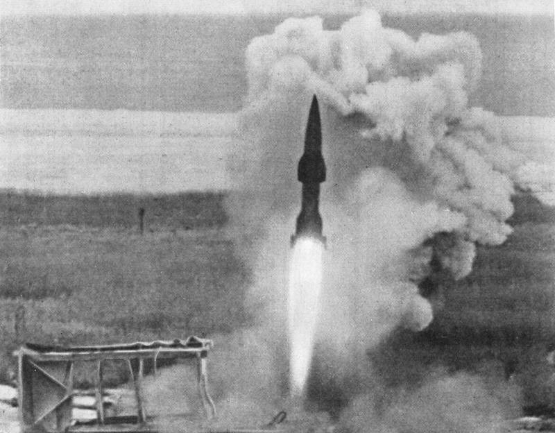 Flugzeugabwehrrakete "Wasserfall" während des Starts, Peenemünde, Prüfstand IX, Herbst 1944